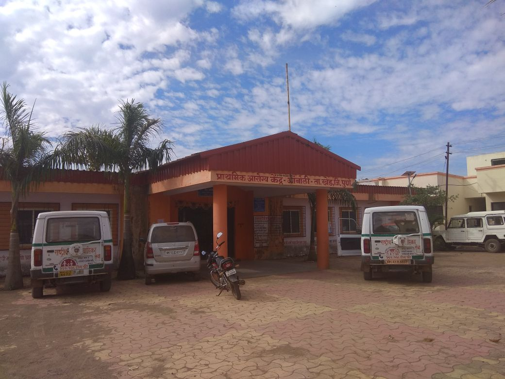 फोटोग्राफ